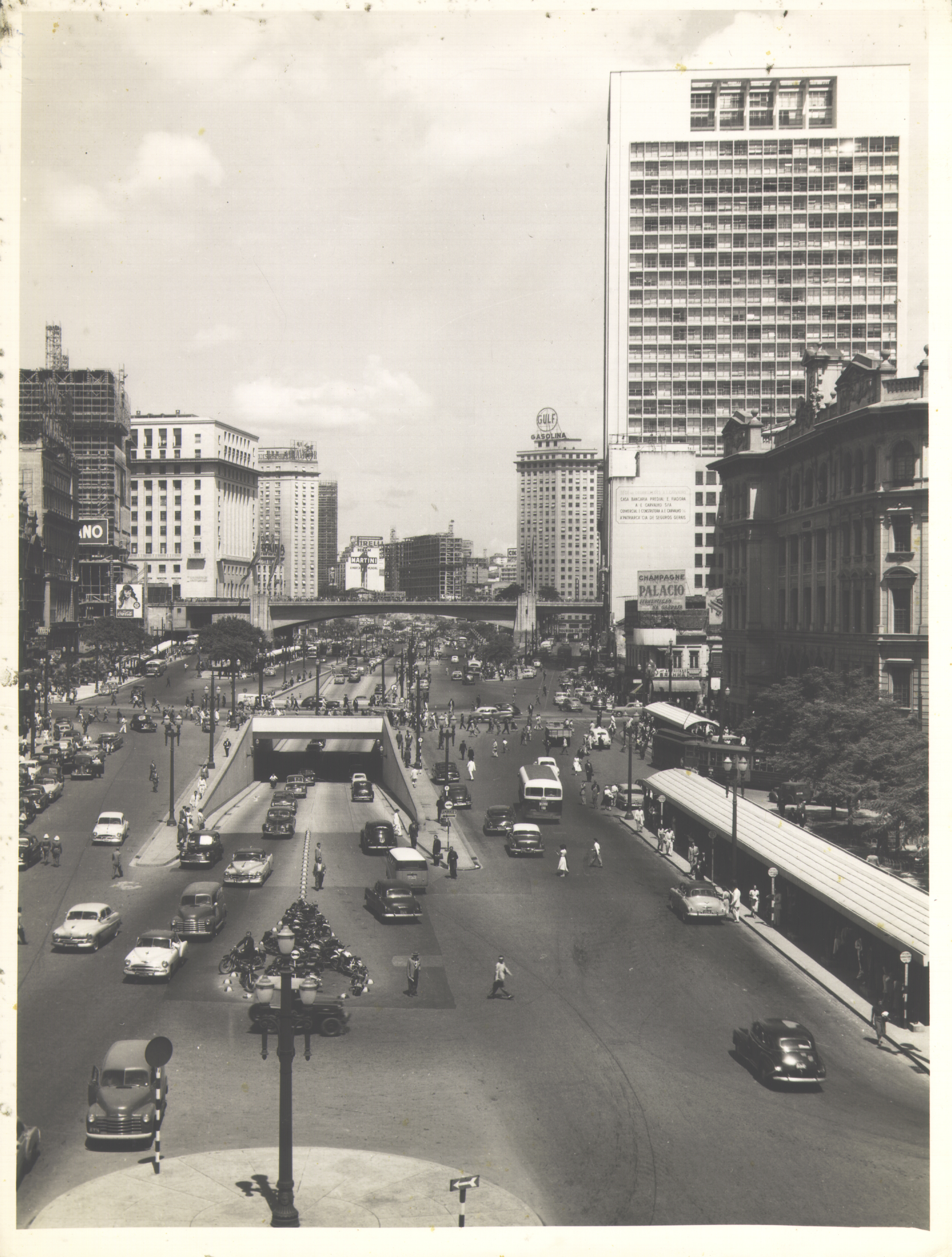 Obra que integra o acervo do Museu Paulista da USP. Coleção Werner Haberkorn